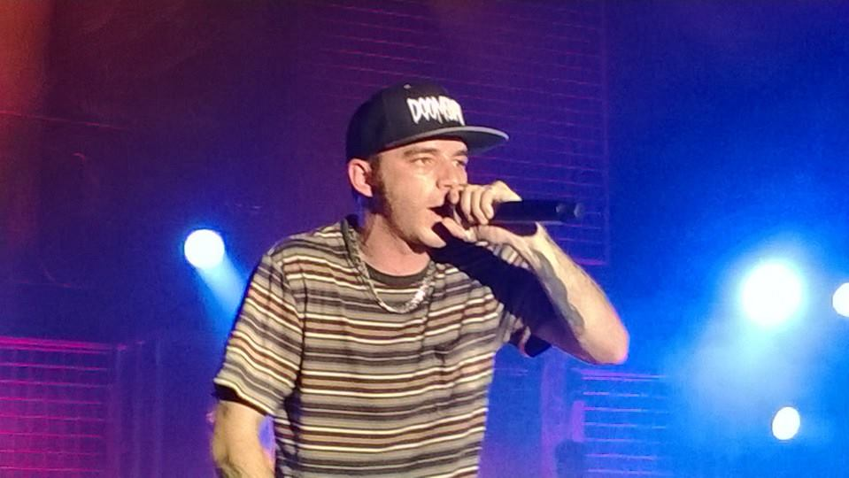 Salmo live a Milano nel 2013